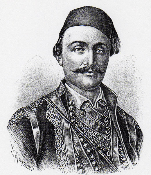 Из српске прошлости: Хајдук Вељко Петровић (1780-1813)